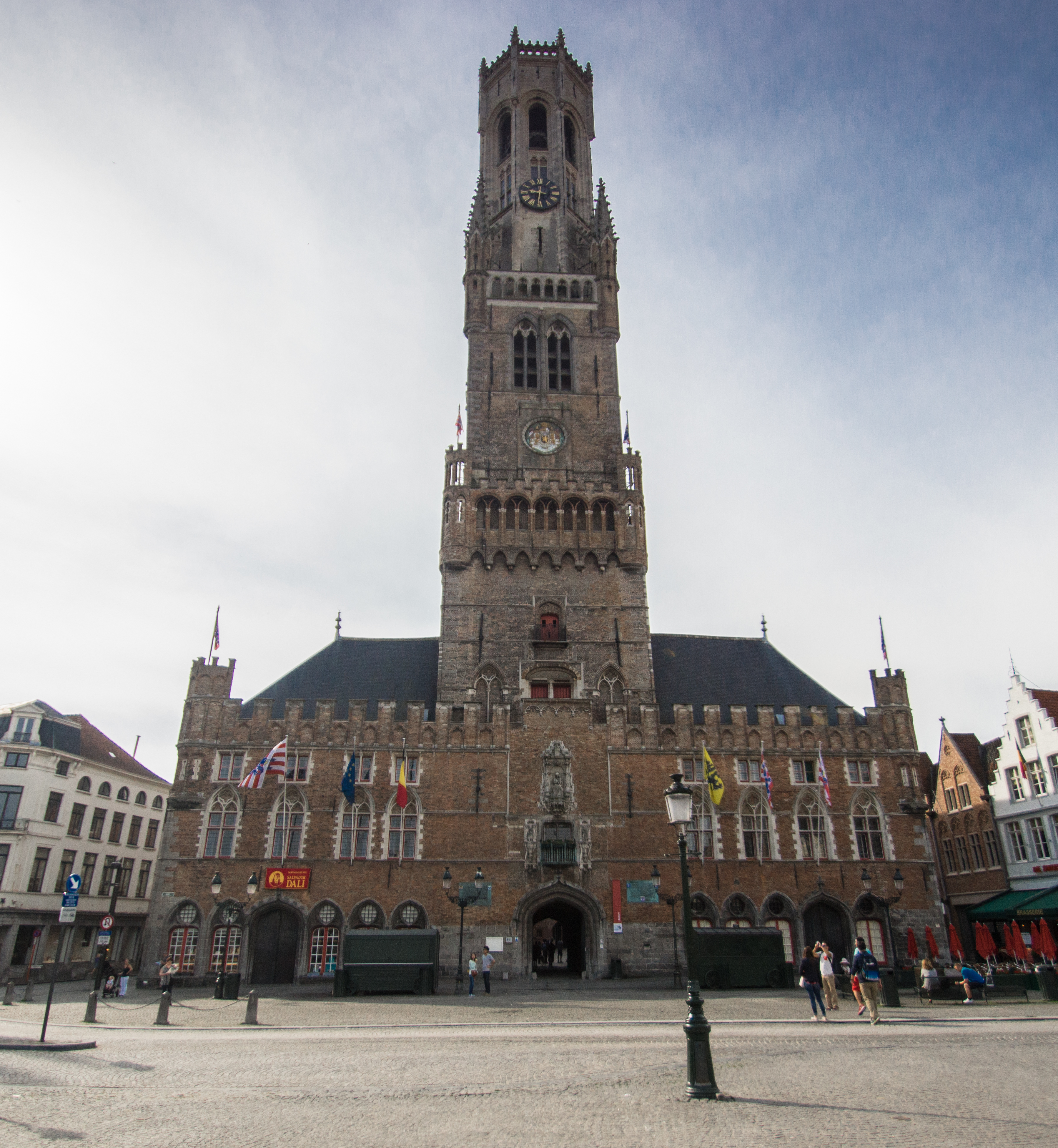 Campanario de Brujas